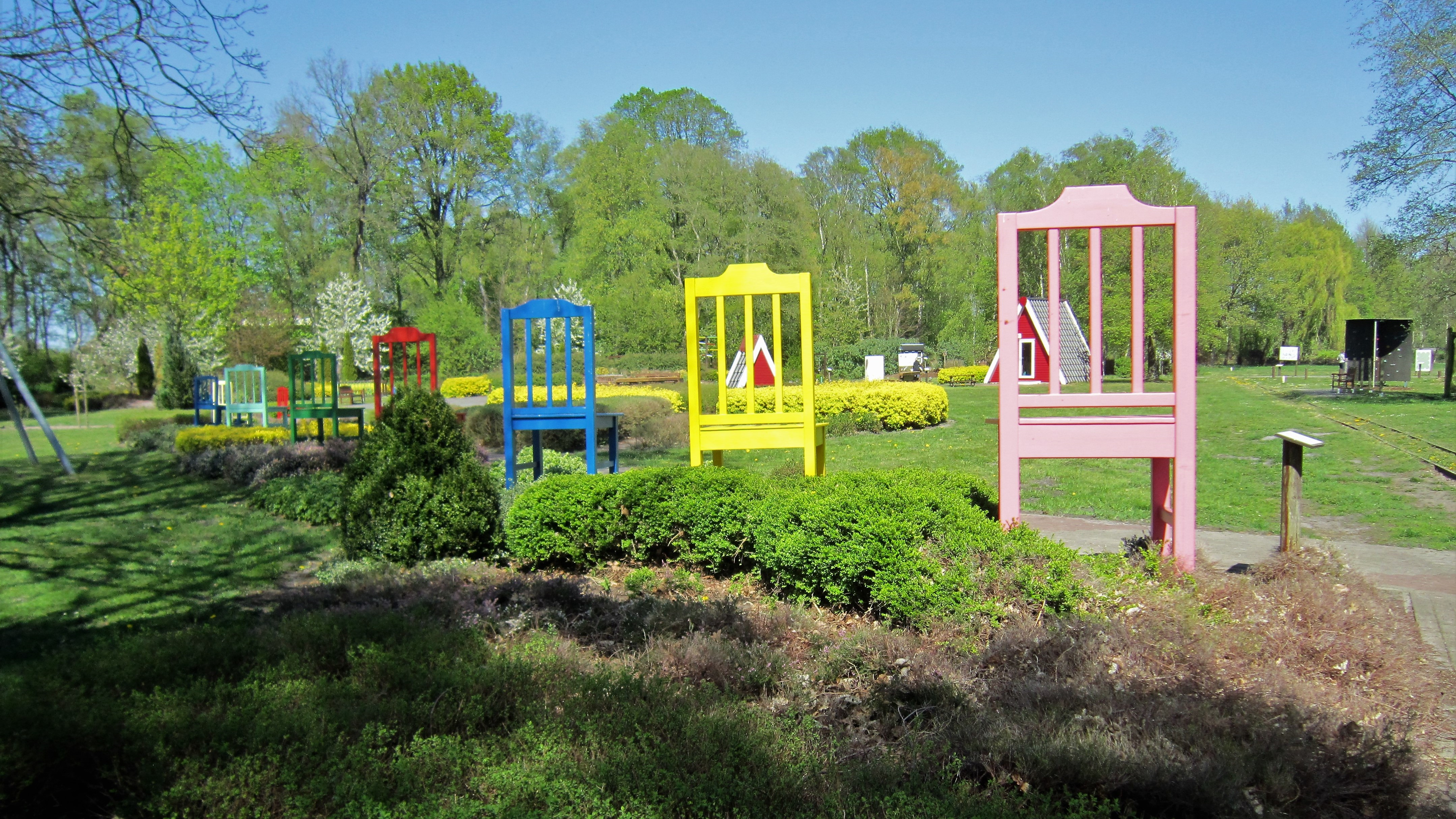 Sinnengarten an der Moorbahnstrecke Freistatt - Heimstatt im Landkreis Diepholz (Niedersachsen). Im Vordergrund eine Reihe mit nach rechts hin größer werdenden Stühlen, rechts Gleis der Moorbahn.